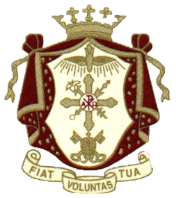 Беларуская (тарашкевіца): Гэрб кангрэгацыі назарыцянак